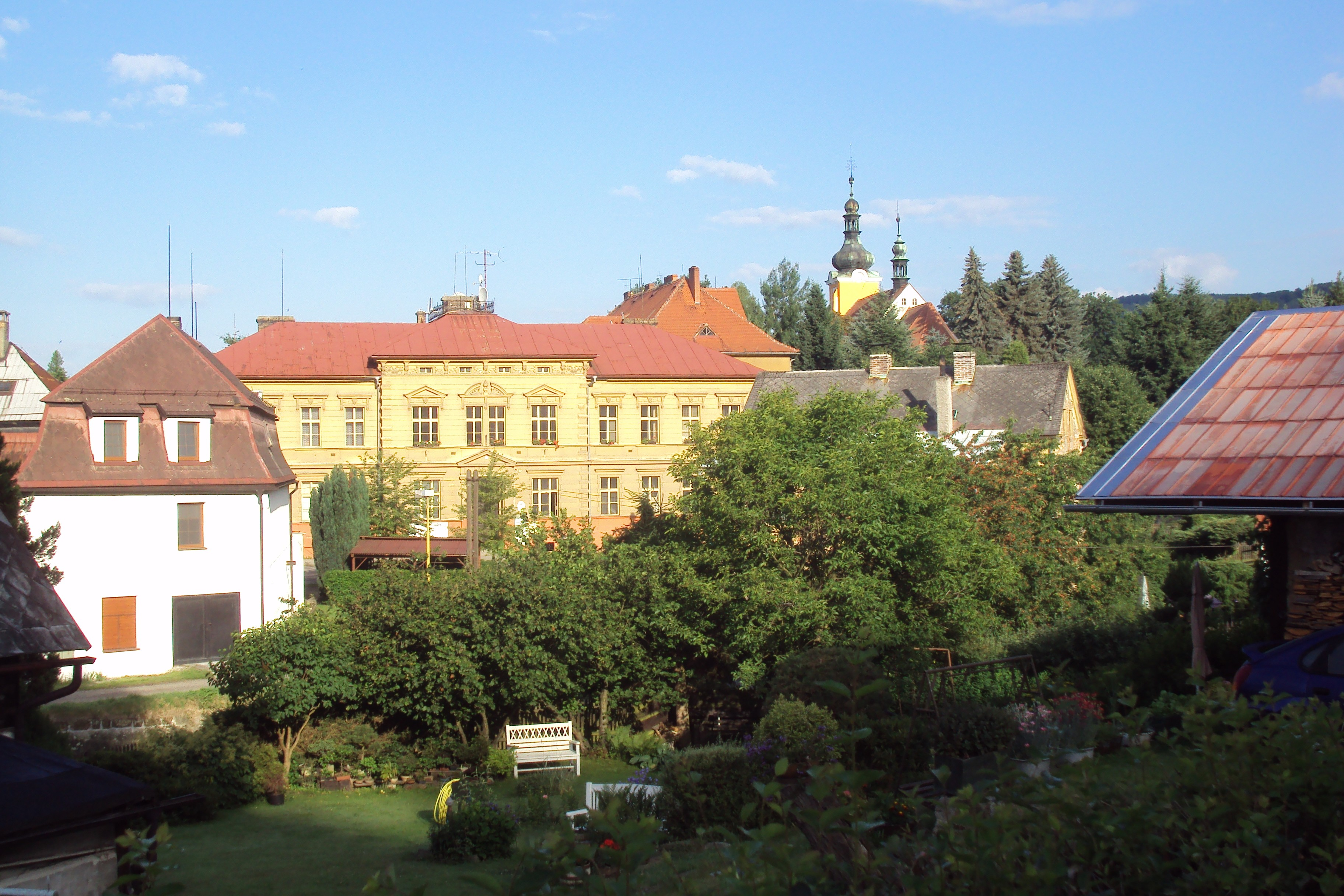 Skalice ze silnice od Pihelu